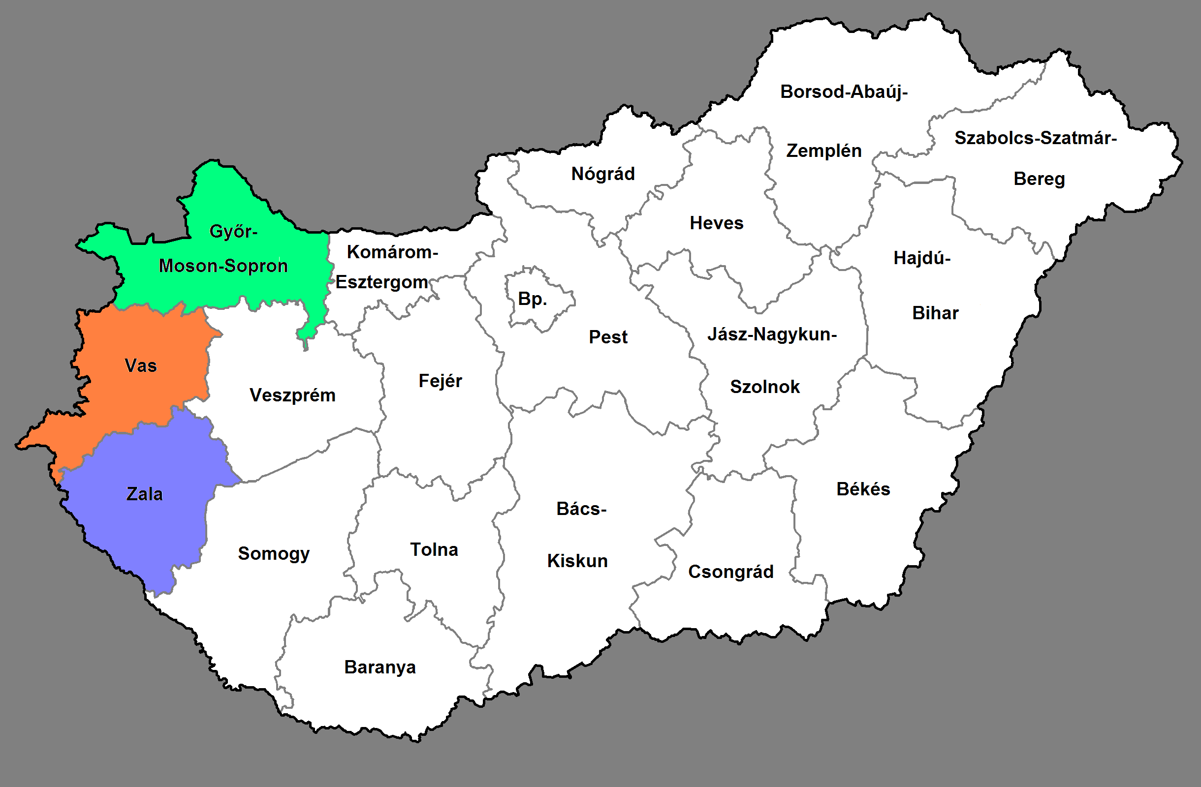 A Nyugat-Dunántúli régió Magyarországon